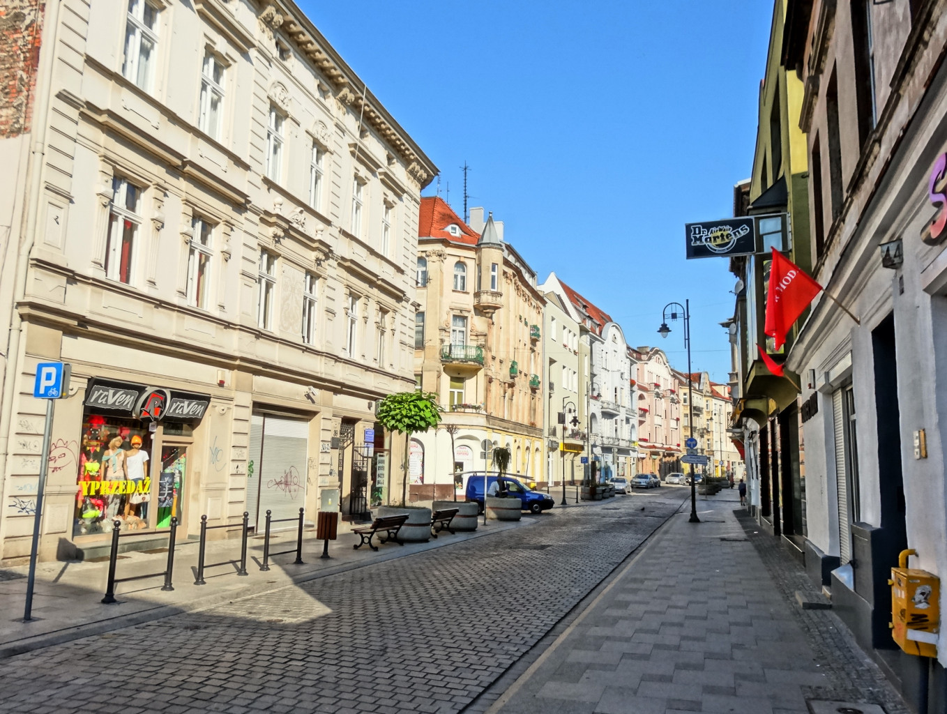 Ulica Dworcowa w Bydgoszczy na odcinku od ul. Warmińskiego do ul. Królowej Jadwigi